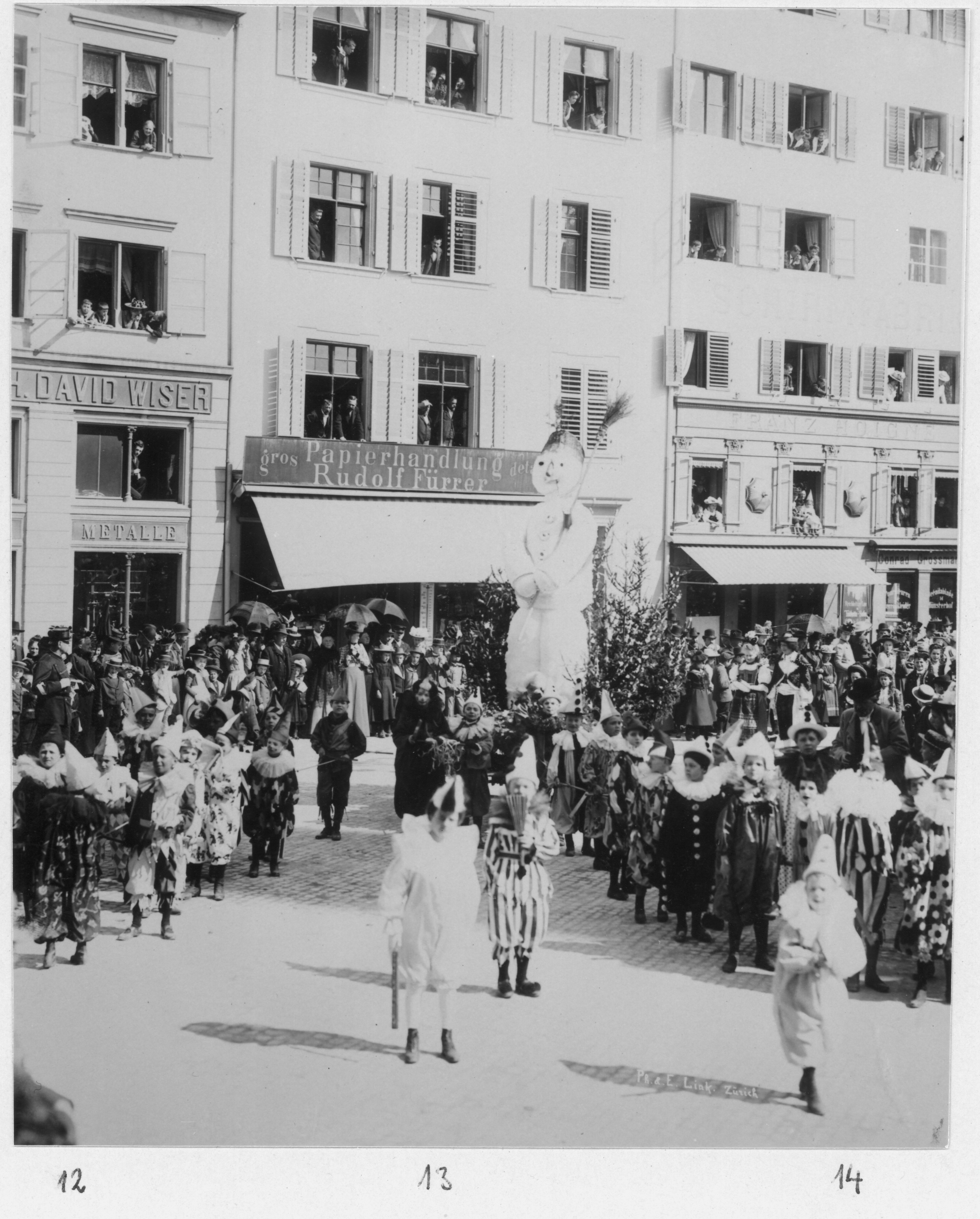 Sechseläuten Kinderumzug um 1896 Münsterhof, Zürich, Schweiz: Der Teilhaber und Privatgelehrte David Friedrich Wiser bewohnte die Wohnung im 2. Stock über der Eisenhandlung seiner Familie am Münsterhof 12 "Haus zur Farb"